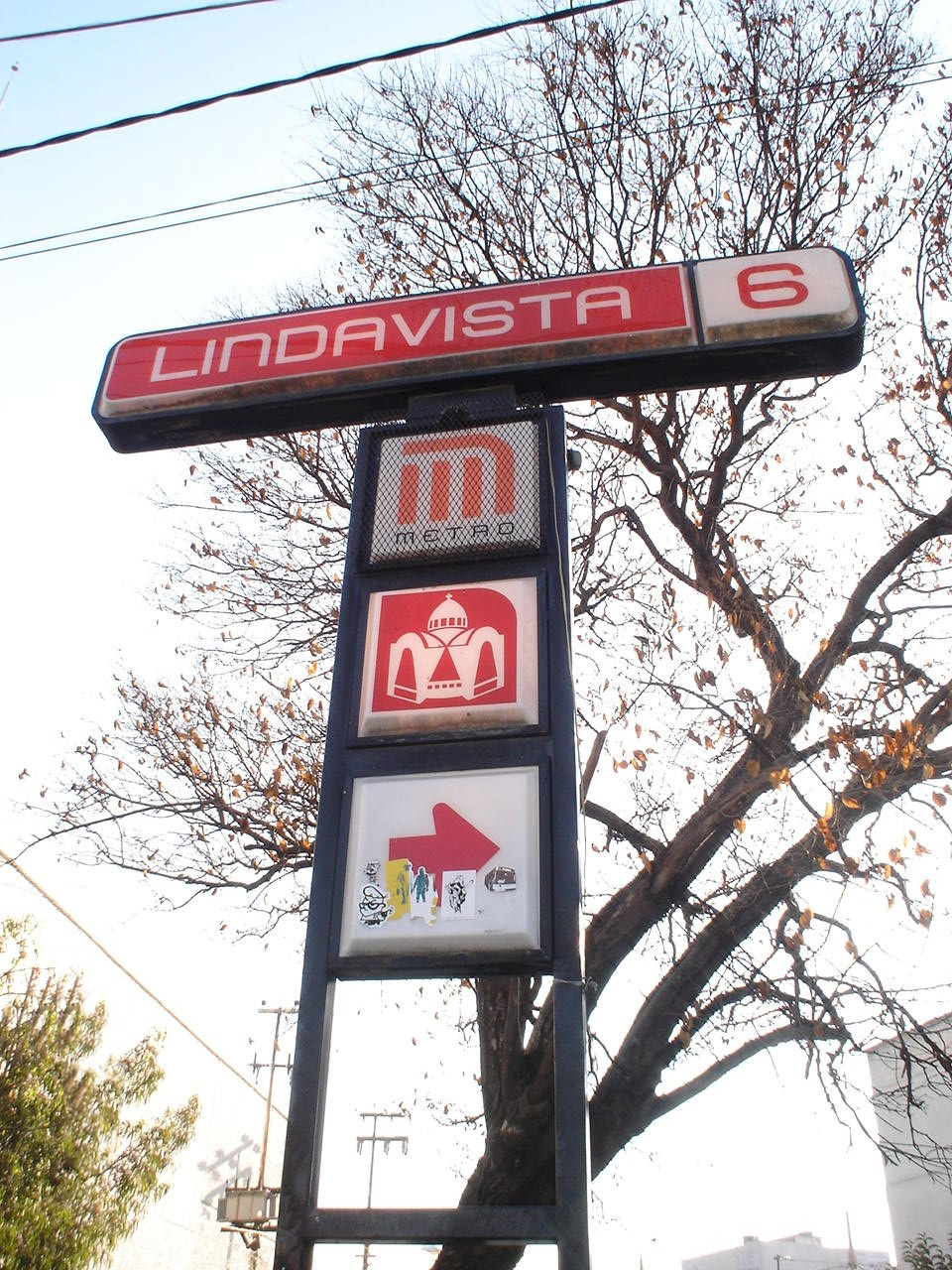 ESTACION LINDAVISTA